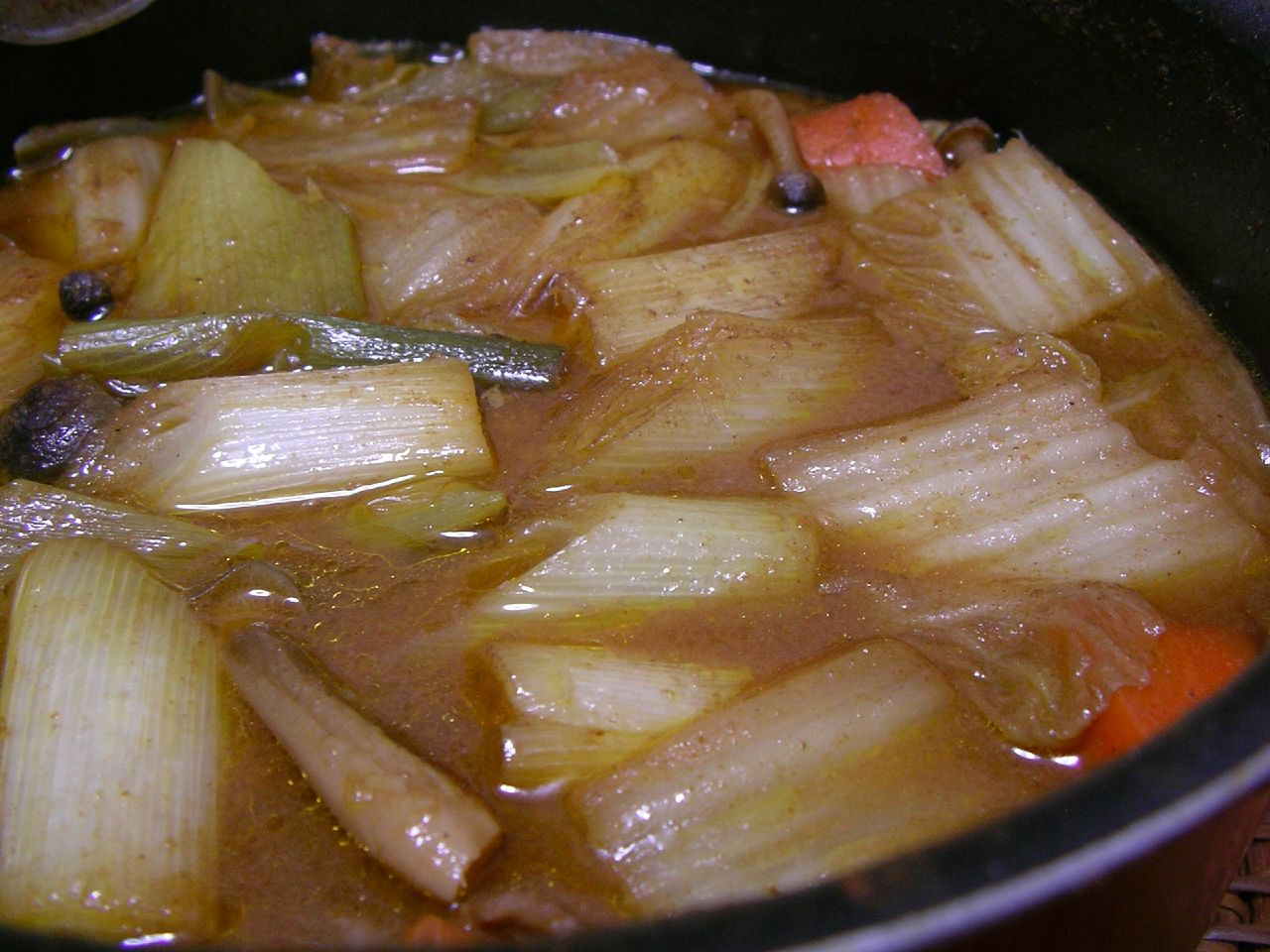 カレー鍋（flickrより）